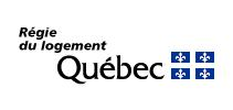 Logo officiel de la Régie du logement du Québec